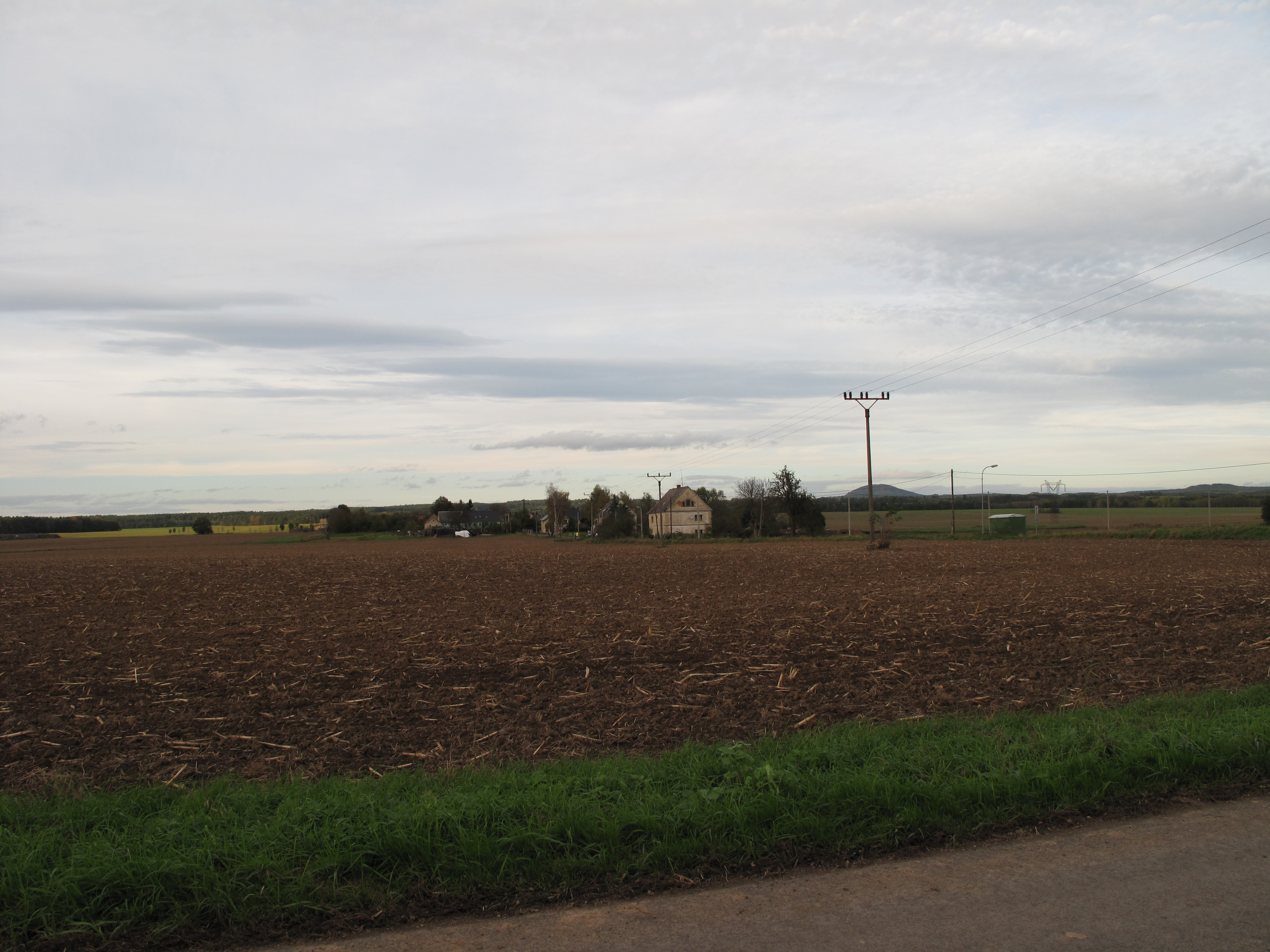 Pohled od jihu na Julčín. Okres Litoměřice, Česká republika.